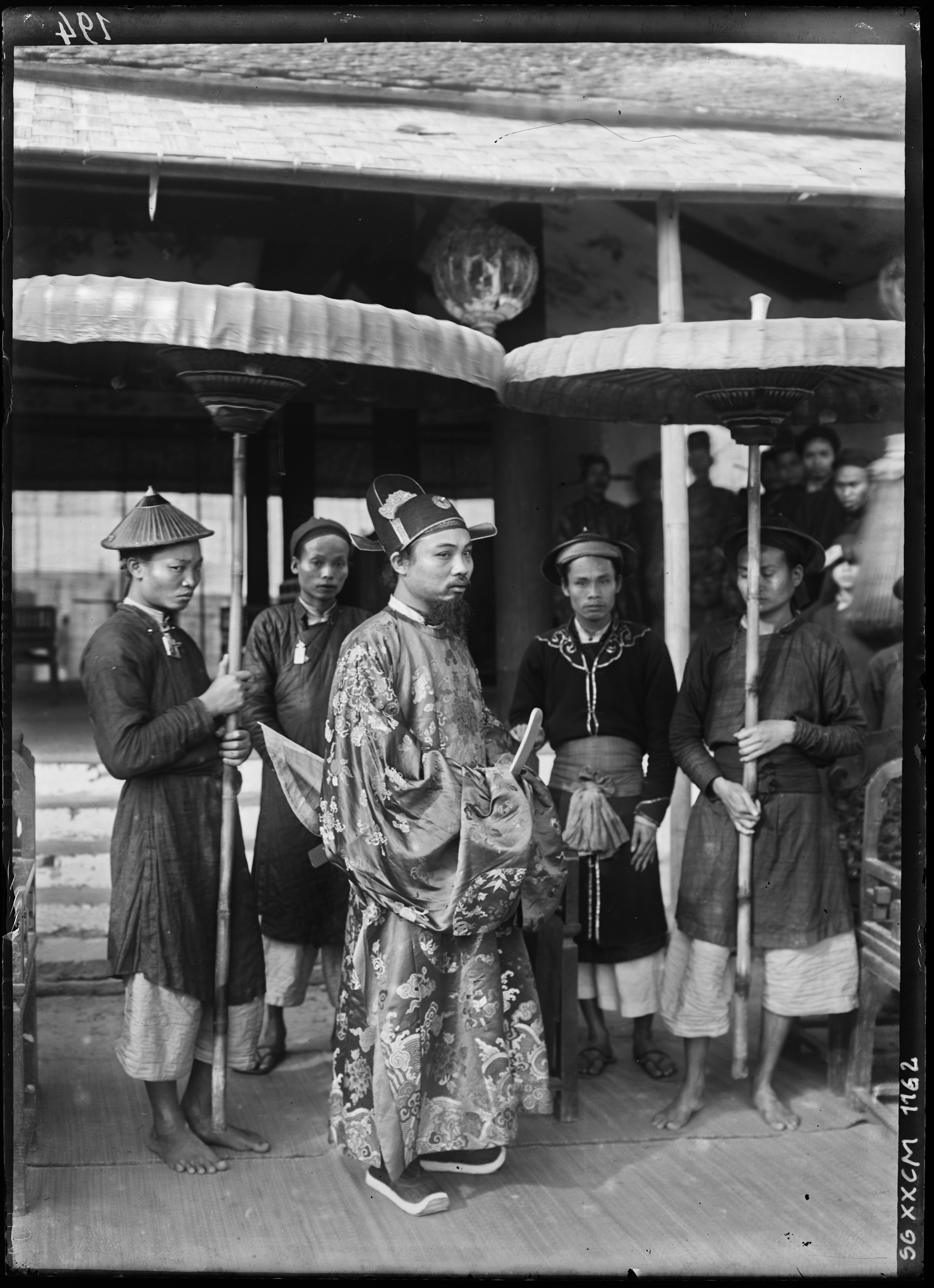 Tonkin. Nam-Dinh. Concours triennal, un examinateur : M. Cao-xuân-Tiêu, giam-khao, fils du tong-duc de Nam-dinh, Cao-xuân-Duc